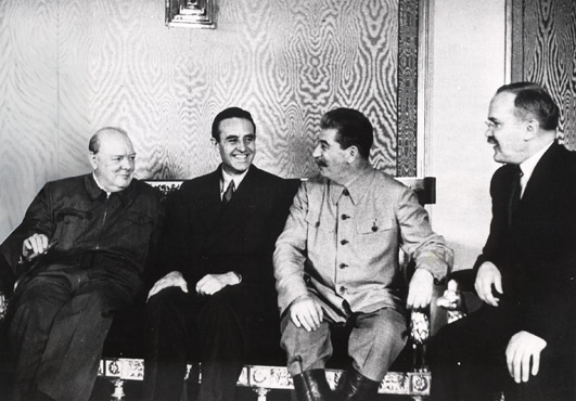 Черчилль, Гарриман, Сталин, Молотов в Москве, август 1942